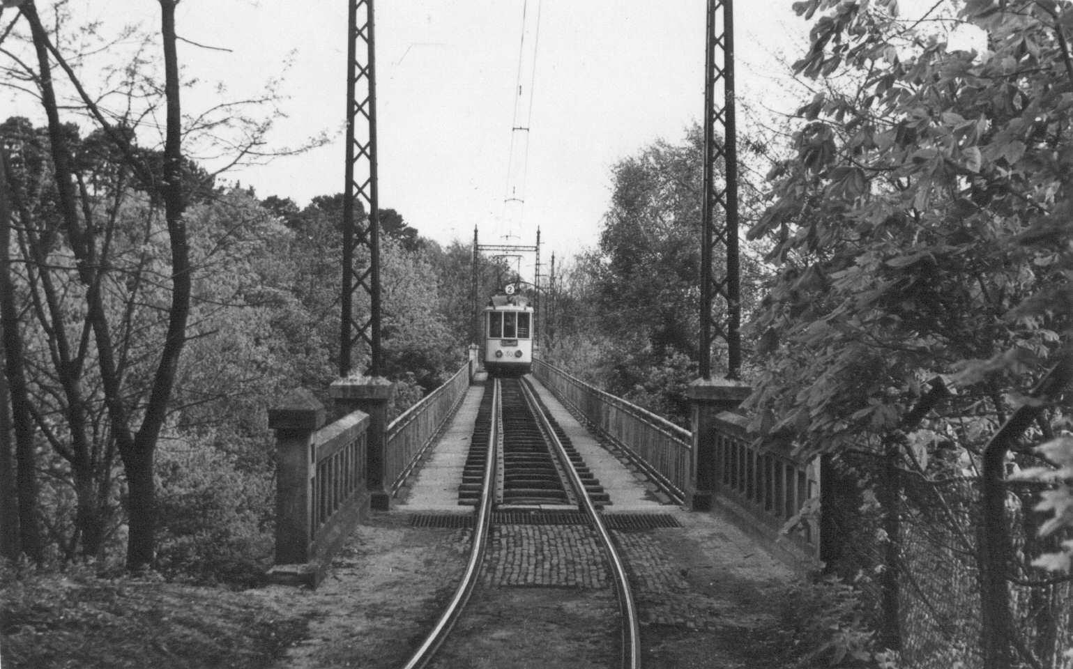 Een tram op het bergspoor (lijn Nijmegen – Berg en Dal). Fotocollectie Regionaal Archief Nijmegen, F56543.